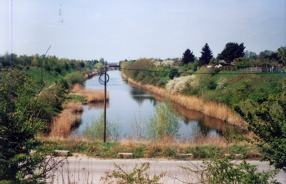 Elster-Saale-Kanal direkt am Lindenauer Hafen in Leipzig, Blick nach Nordwesten